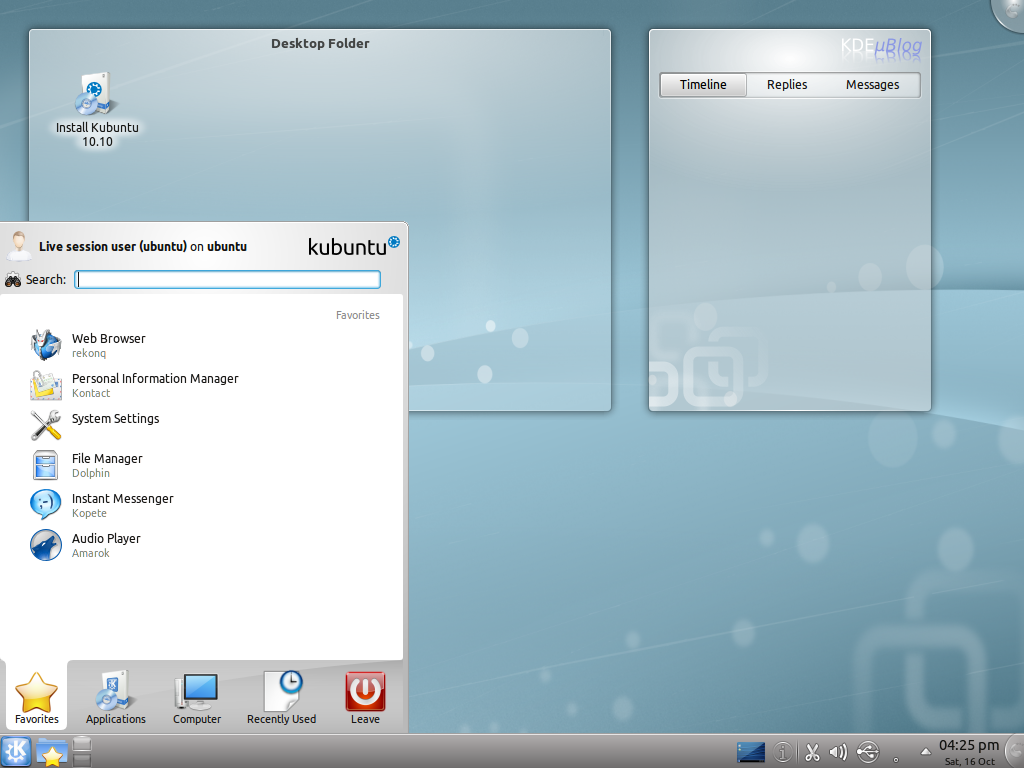 Kubuntu 10.10 main menu, default desktop appearance on startup